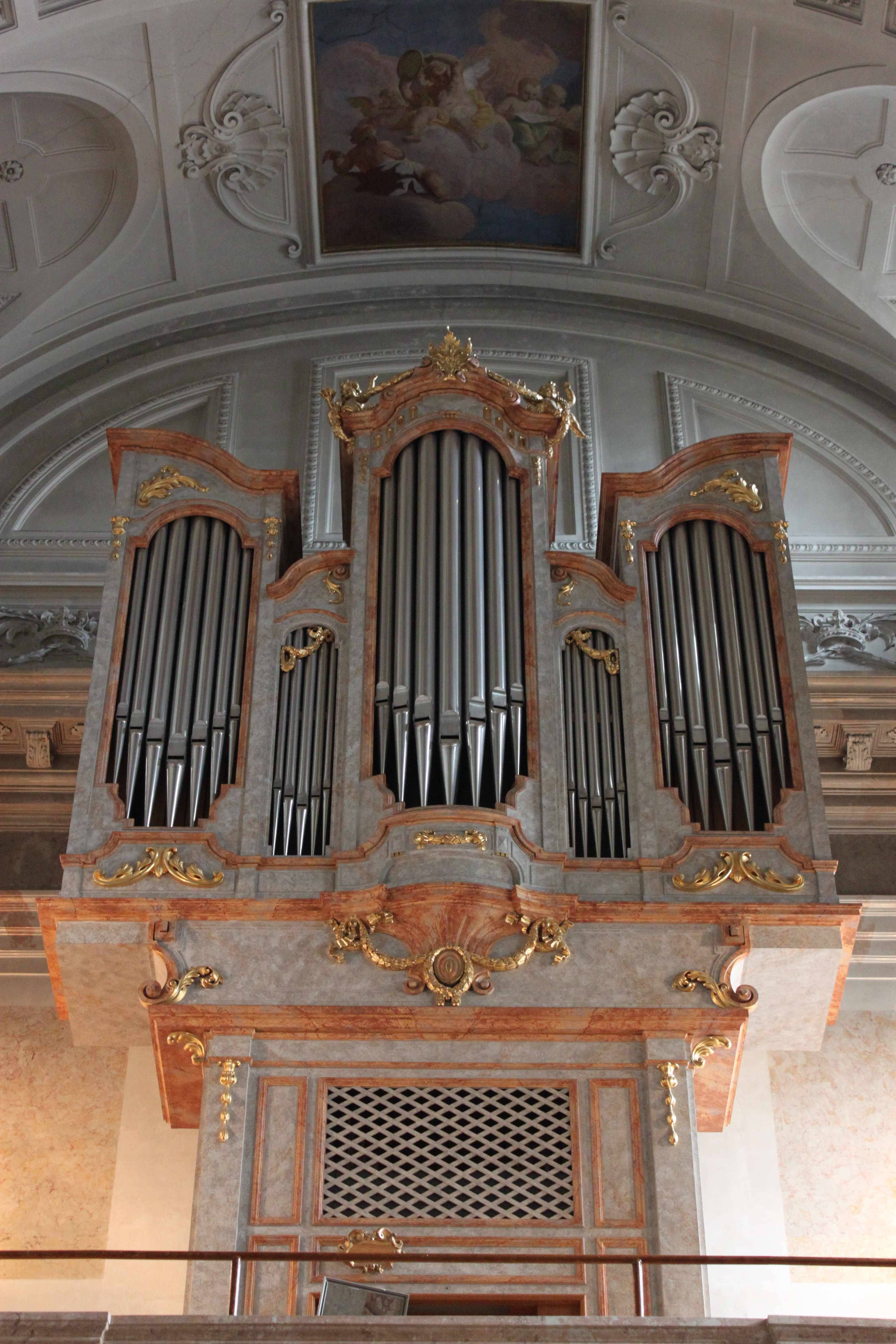 Orgel der Schlosskapelle Schönbrunn, errichtet 1984 von Rieger Orgelbau